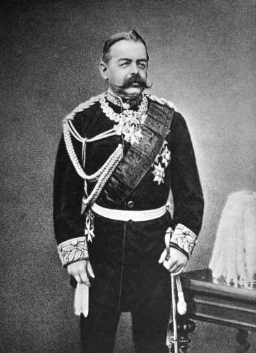 Victor Herzog von Ratibor (1818-1893)